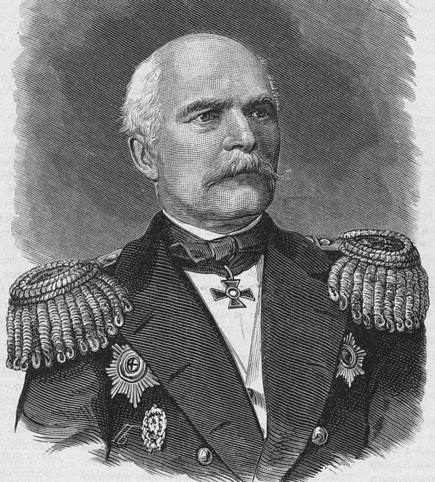 Адмирал РИФ Геннадий Иванович Невельской (Невельский). Этот рисунок был использован для иллюстрирования статьи «Невельской, Геннадий Иванович» опубликованной в шестнадцатом томе «Военной энциклопедии», который был издан книгоиздательским товариществом И. Д. Сытина в 1914 году в столице Российской империи городе Санкт-Петербурге. Более подробное описание к этой иллюстрации можно прочесть в указанной выше статье на сайте Русской Викитеки.